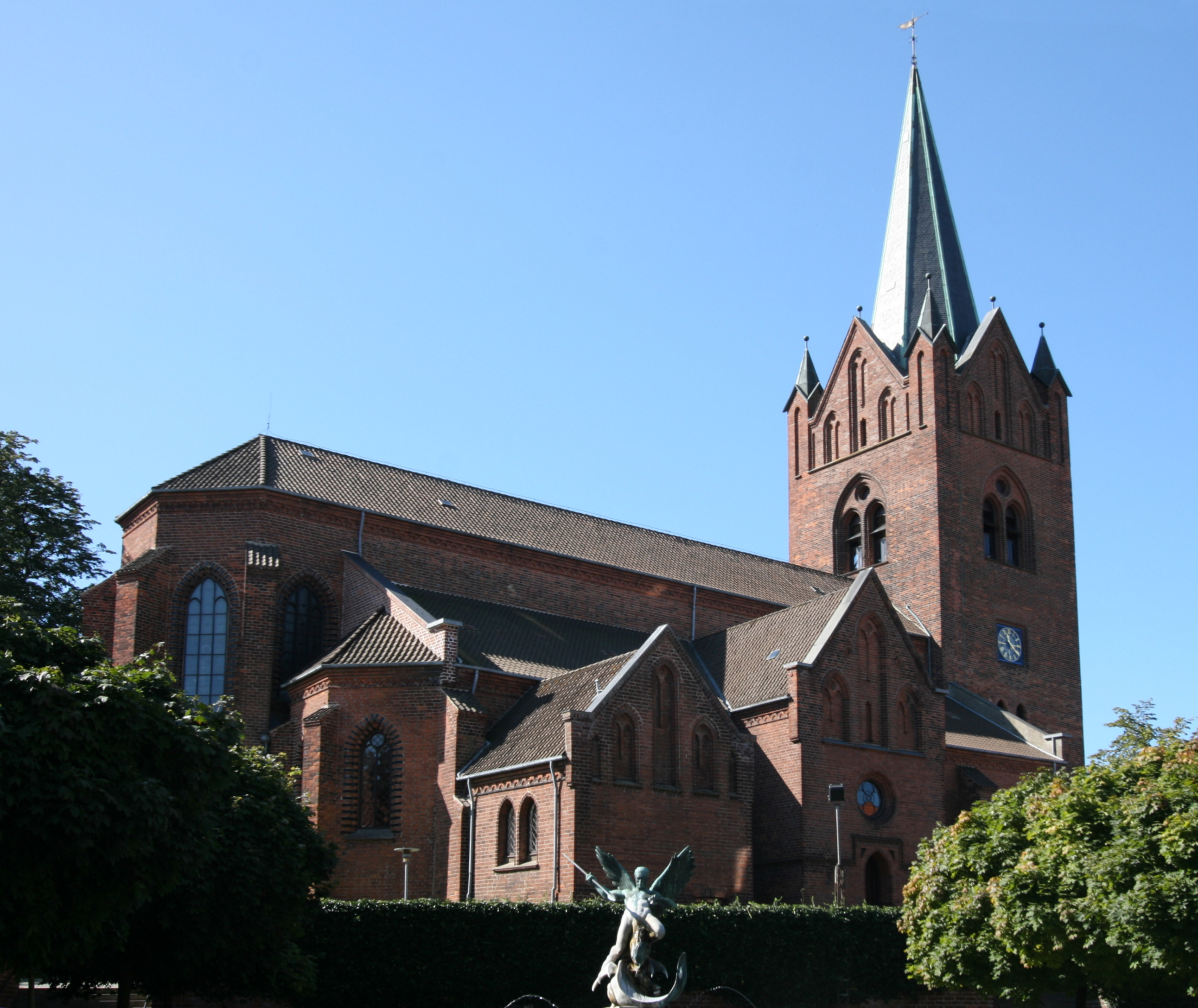 Sankt Mikkels Kirke, Slagelse, Denmark.